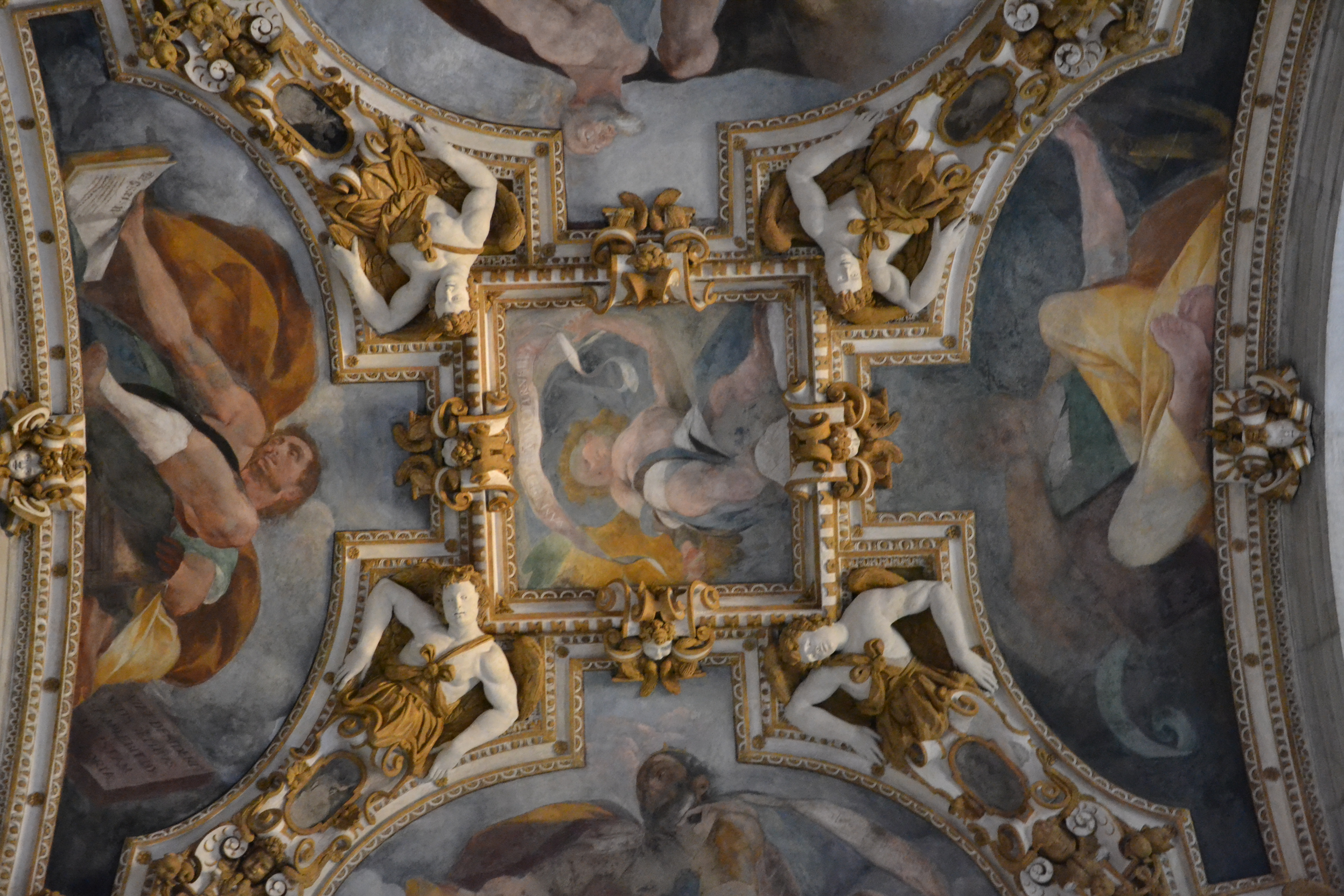 Interno della chiesa di Santa Maria dei Miracoli a Milano, volta della navata sinistra, affreschi di Giovan Battista Crespi detto il Cerano